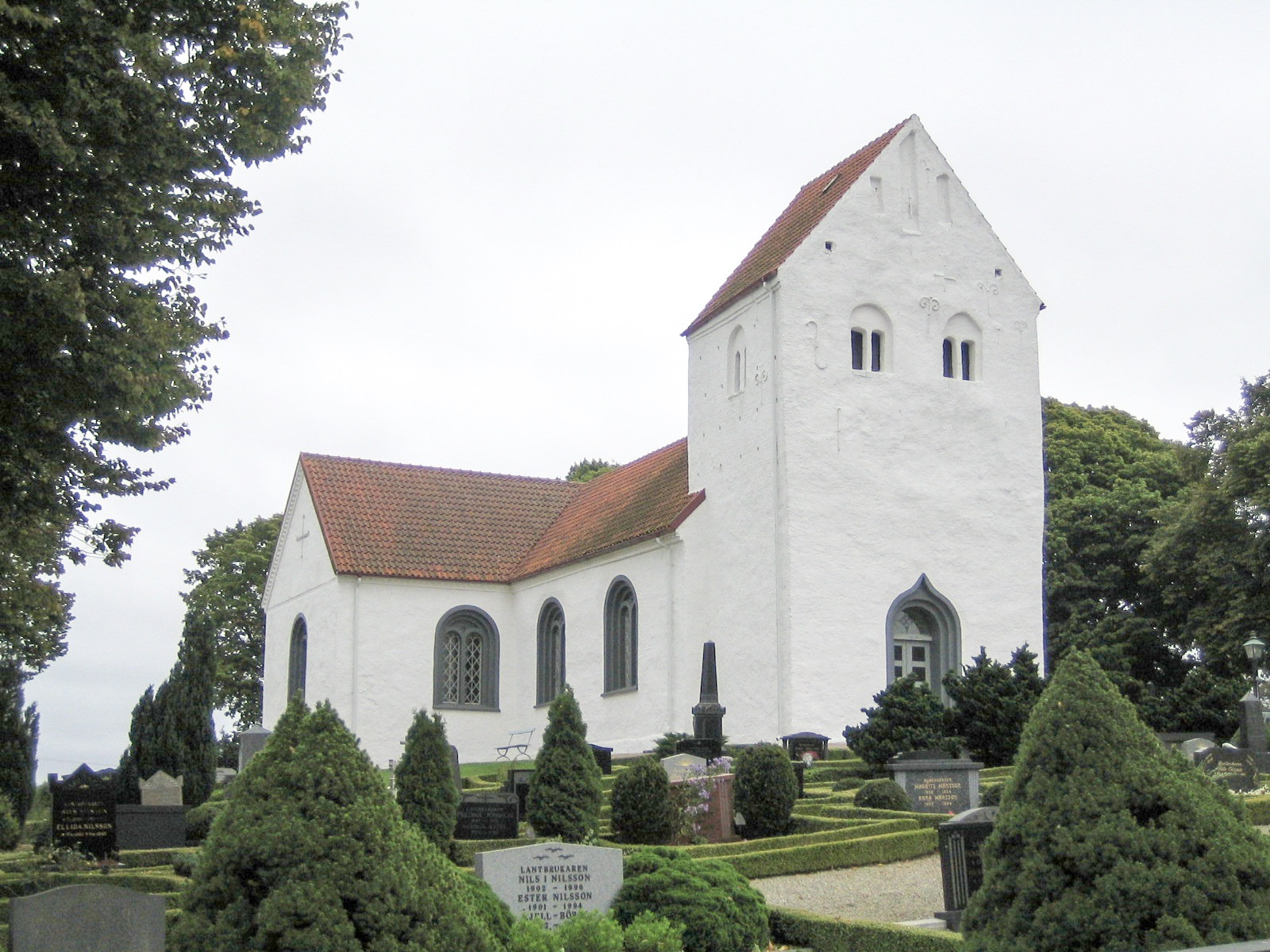 Bromma kyrka, Ystad